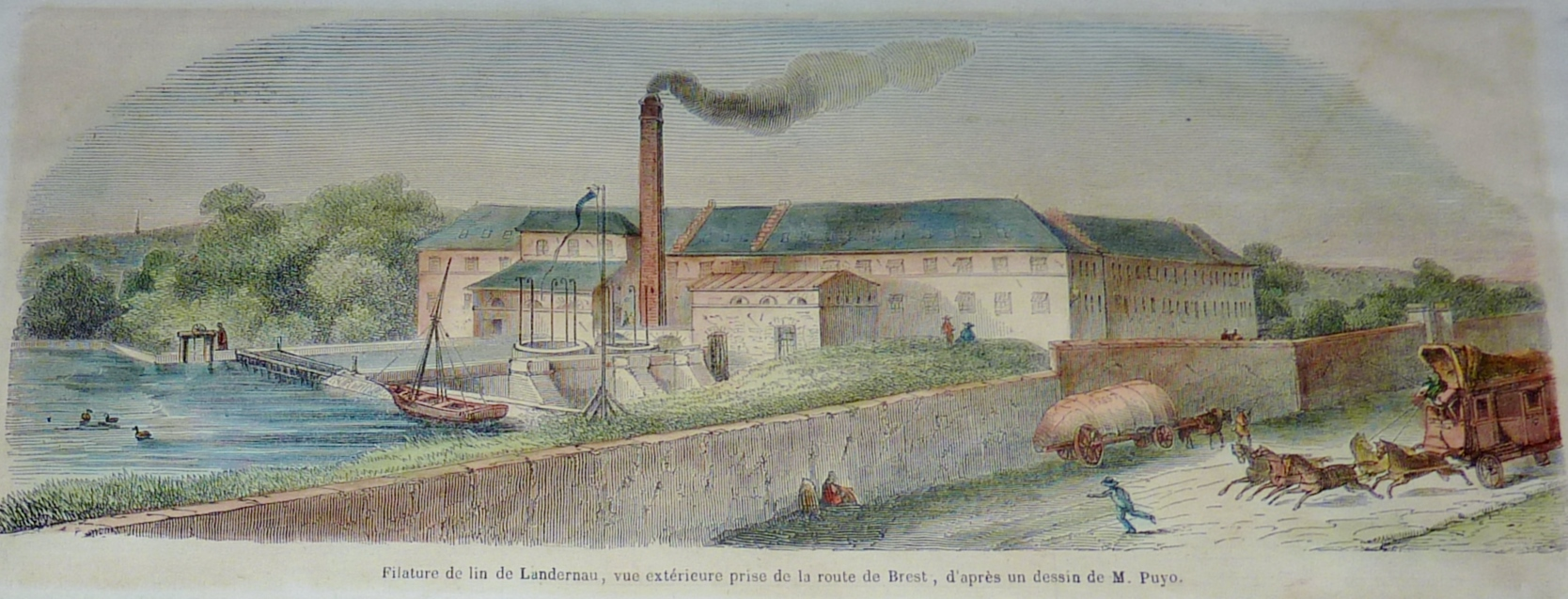 La Société Linière de Landerneau (gravure de Constant Puyo datant probablement des environs de 1880)